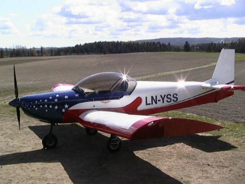 Bilde av Zenair CH 601 på Stokker, Kløfta. Eiere Sten Bergersen & Sven Borger Fiedler